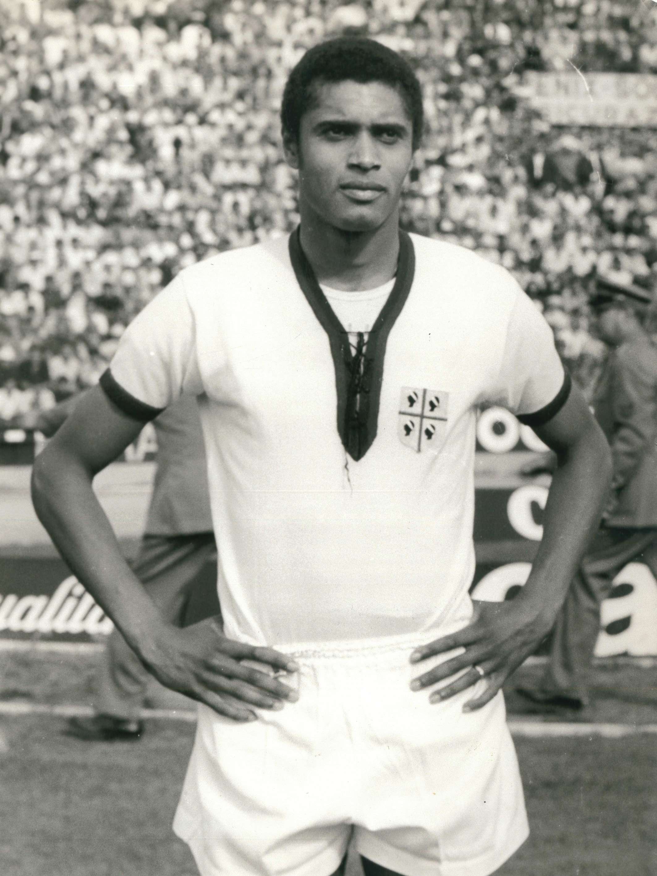 Il calciatore brasiliano Claudio Olinto de Carvalho "Nené" al Cagliari nella stagione 1969-70, in cui il club vince per la prima e fin qui unica volta il campionato italiano di calcio — primo successo assoluto, nella storia del calcio italiano, per una squadra del Mezzogiorno —; nell'immagine Nené indossa la seconda divisa dell'epoca del Cagliari, bianca con bordini rossoblù, spesso utilizzata in quell'annata per ragioni scaramantiche.